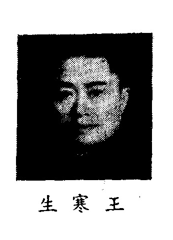 中文（中国大陆）: 制憲國民大會代表